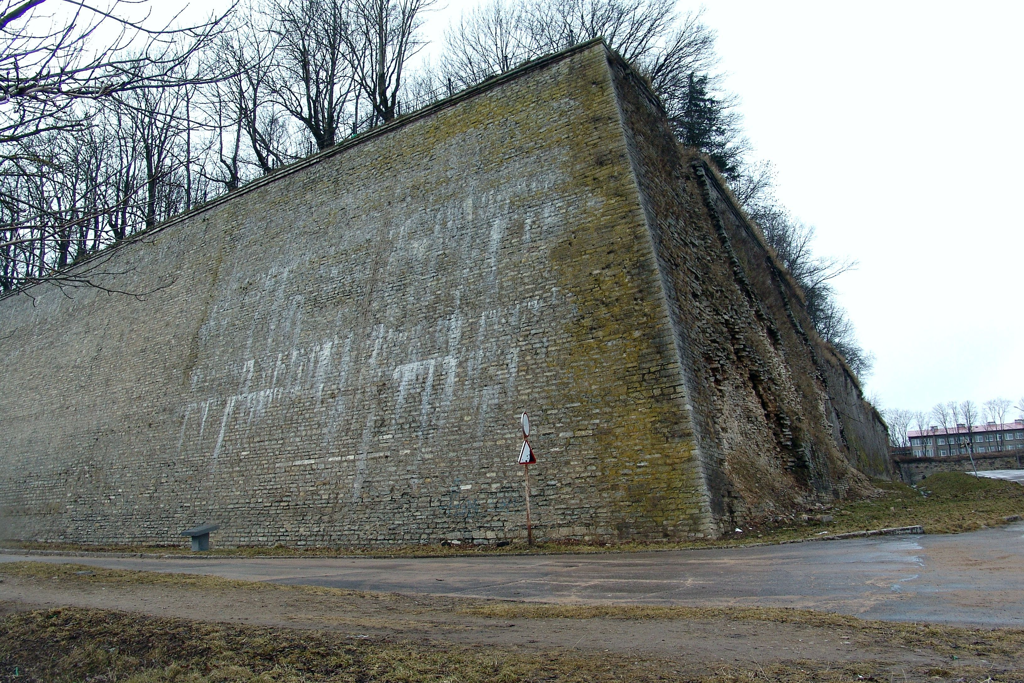 Бастион Виктория